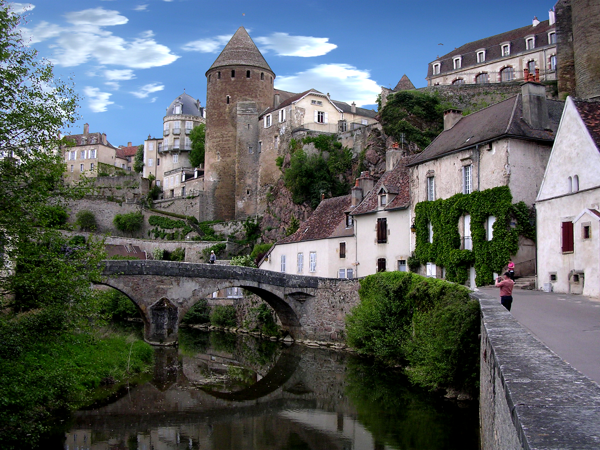 Semur-en-Auxois, Bourgogne, Côte-d'Or, l'Armançon et le pont Pinard